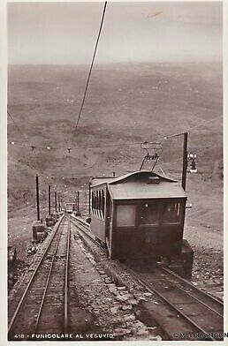 "Funicolare al Vesuvio". Cartolina; catalogo n° 418. Autore sconosciuto.